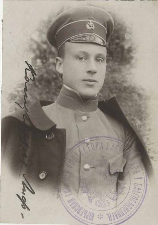 Tartu keiser Aleksander I gümnaasiumi 6. klassi õpilane, amatöörfotograaf Ernst Wittow koolivormis, portreefoto